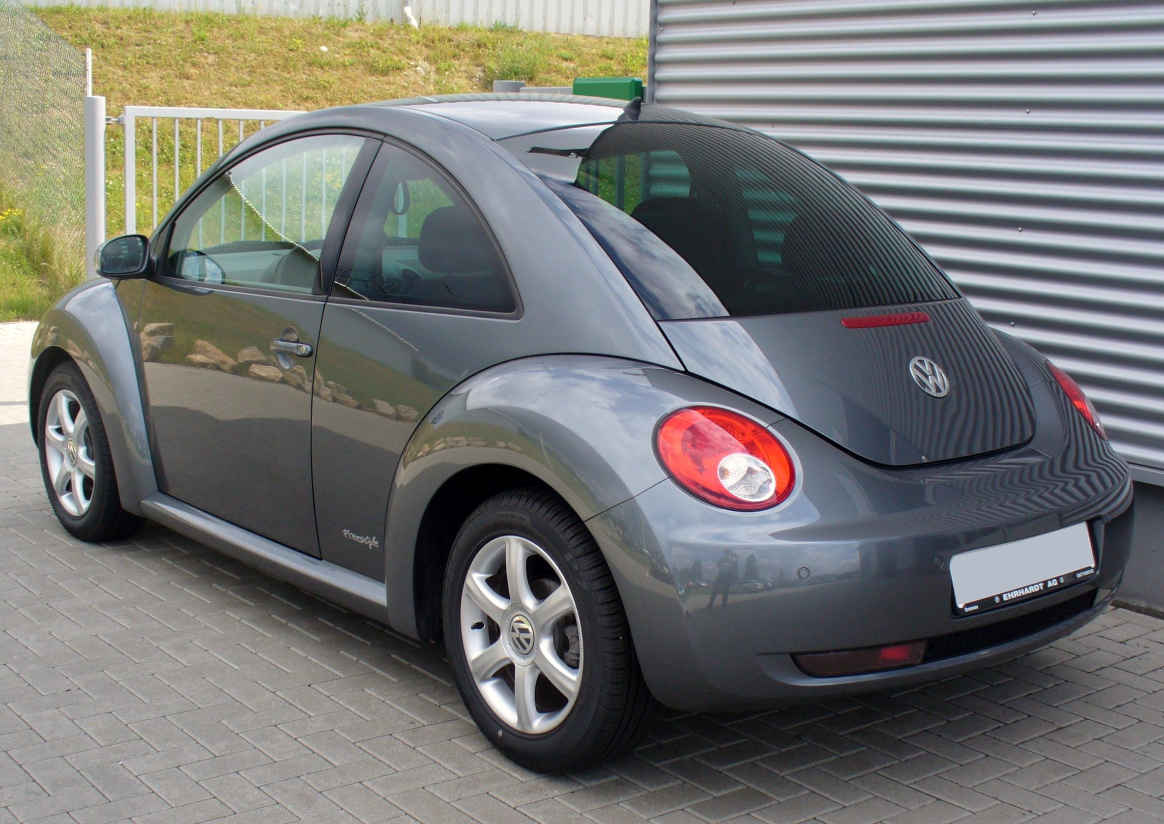 VW New Beetle